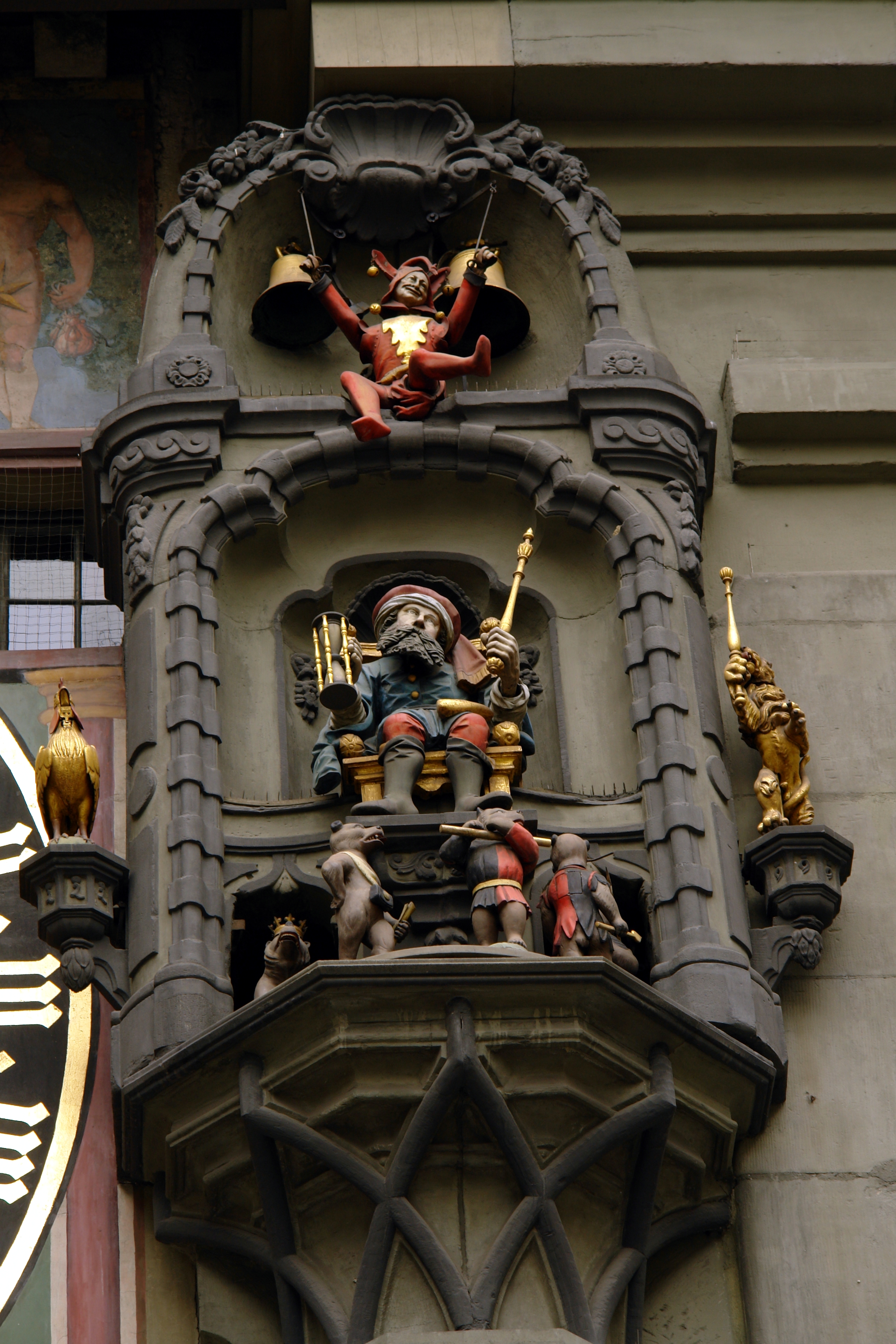 Carillon de Zytglogge, Berne, Suisse.